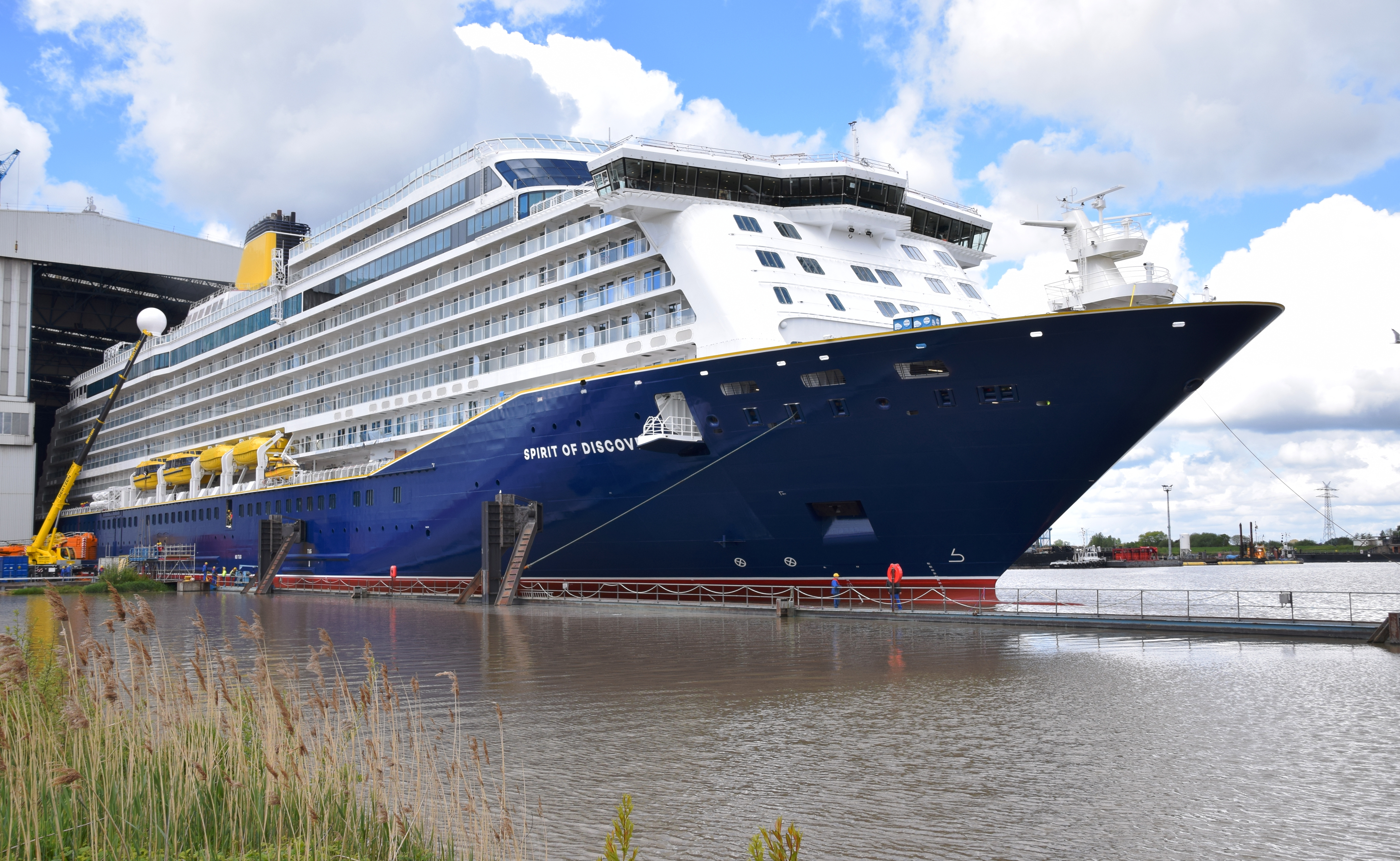 Spirit of Discovery